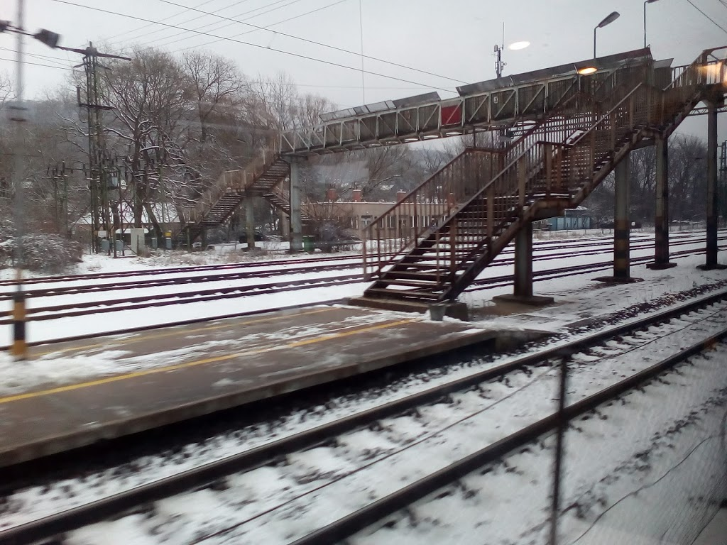 Szárliget vasútállomás